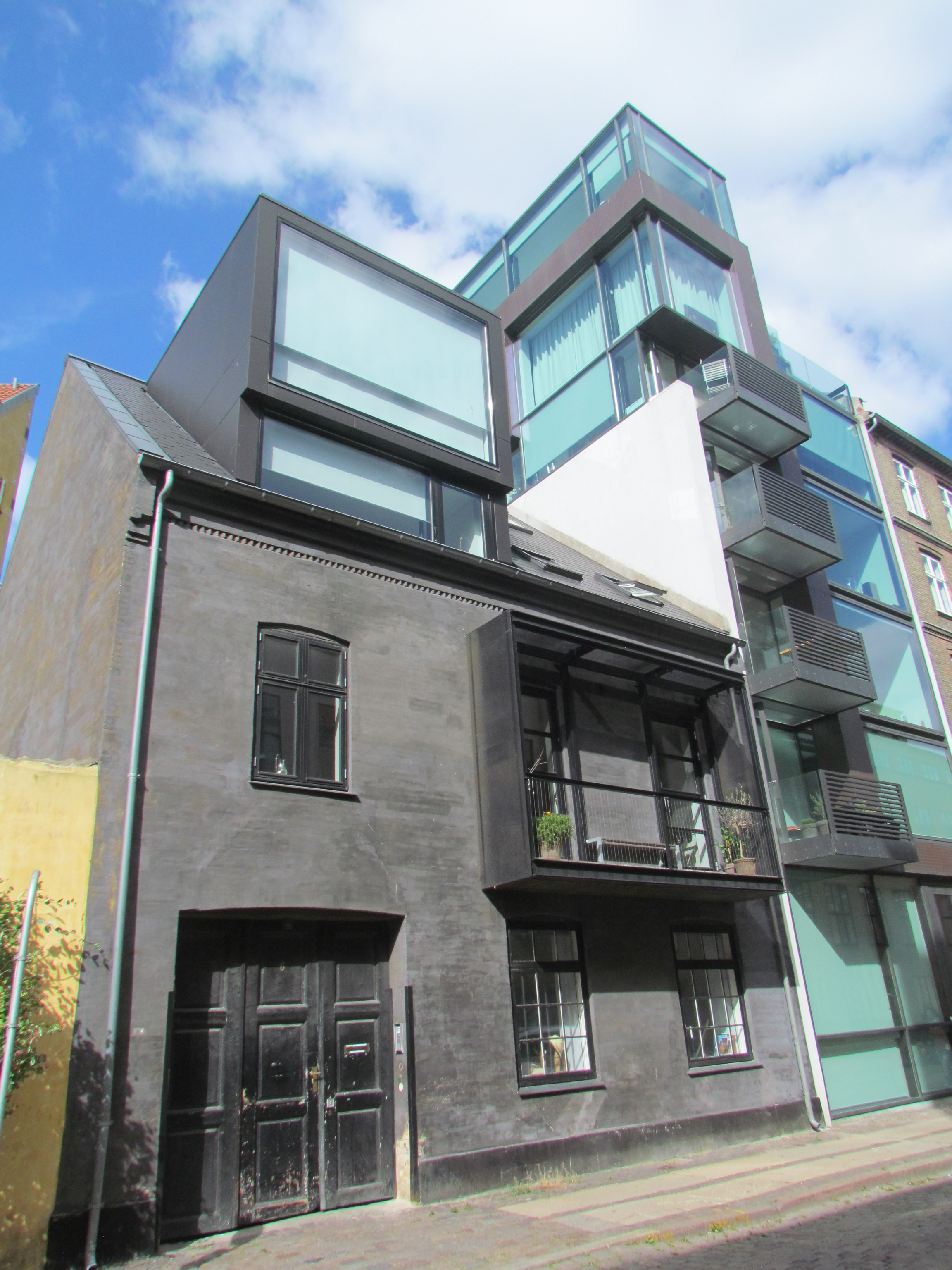 Stokhusgade 4B in Copenhagen, Denmark